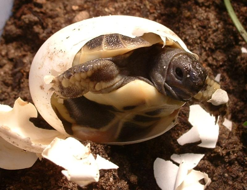 Eine kleine Testudo hermanni boettgeri schlüpft aus dem Ei. Am Bauchnabel sind noch deutliche Dotterreste zu erkennen. Aus diesem Grund werden die Eier jetzt wie in der Natur komplett vergraben bebrütet. Die Schlüpflinge kommen so erst an die Oberfläche, wenn der Dottersack eingezogen und die Nabelöffnung geschlossen ist.